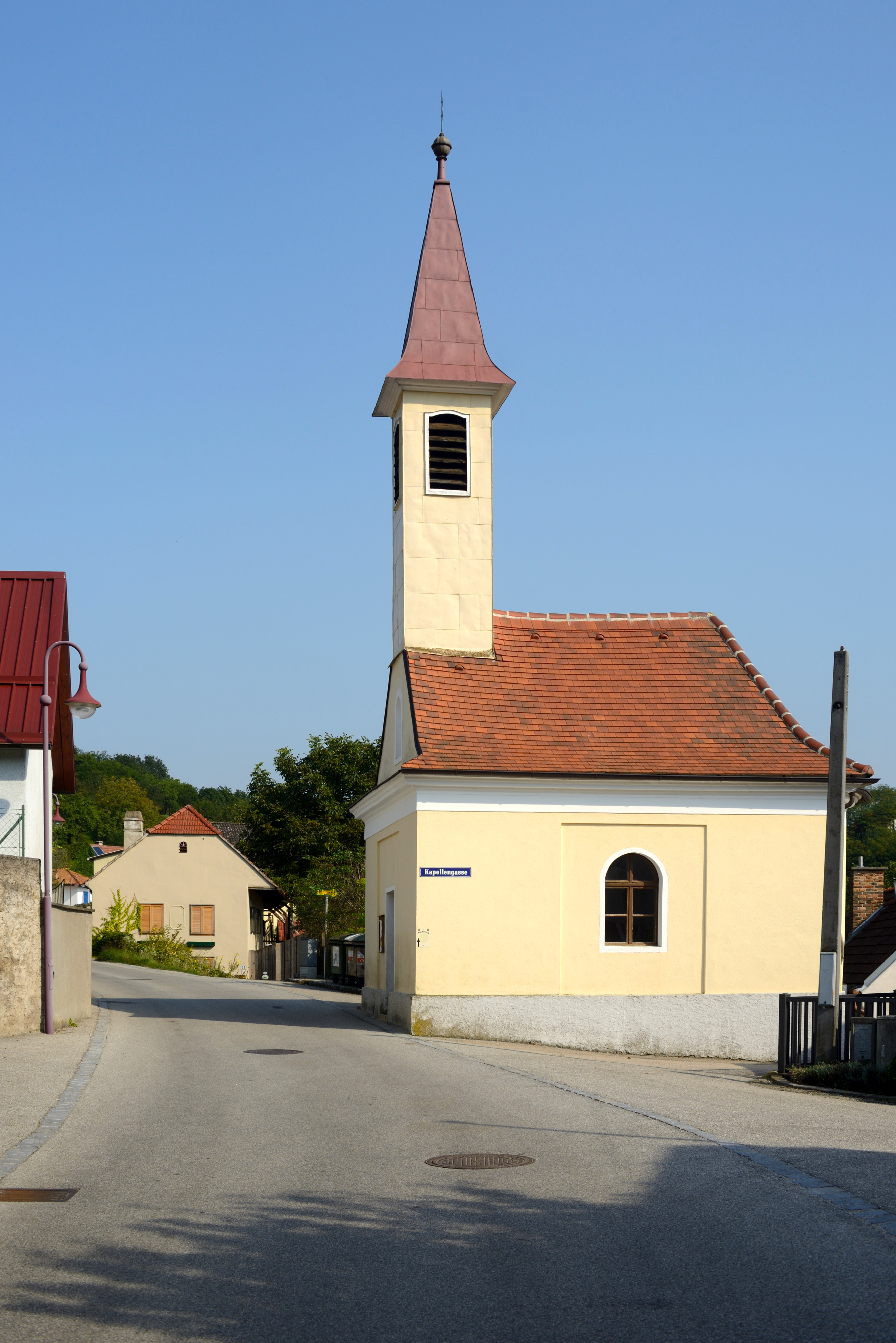 Kapelle im Ortszentrum von Paudorf.